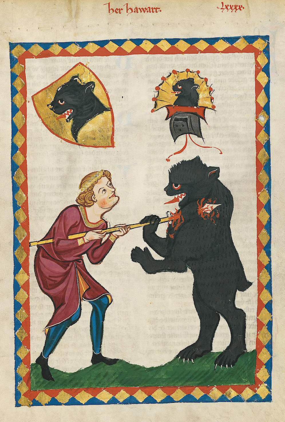 Codex Manesse, UB Heidelberg, Cod. Pal. germ. 848, fol. 313r: Herr Hawart